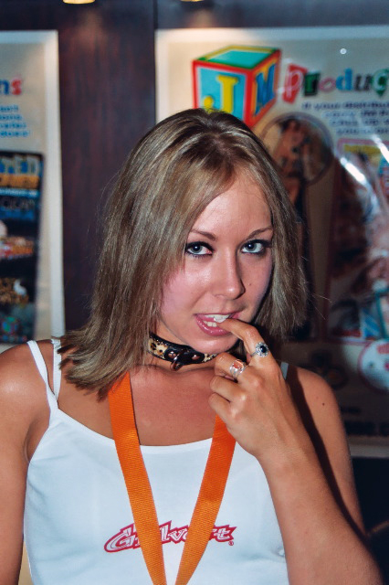 Julie Night